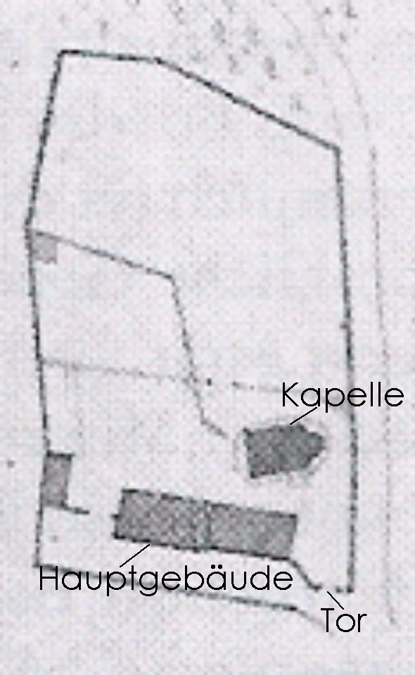 LAGEplan der Kommende Ramersdorf - 1845 - Skizze von Lassaulx (Ausschnitt).